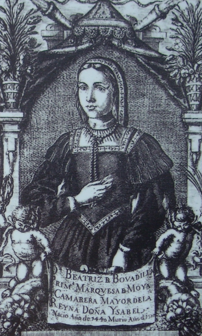 Beatriz de Bovadilla, la primera marquesa de Moya